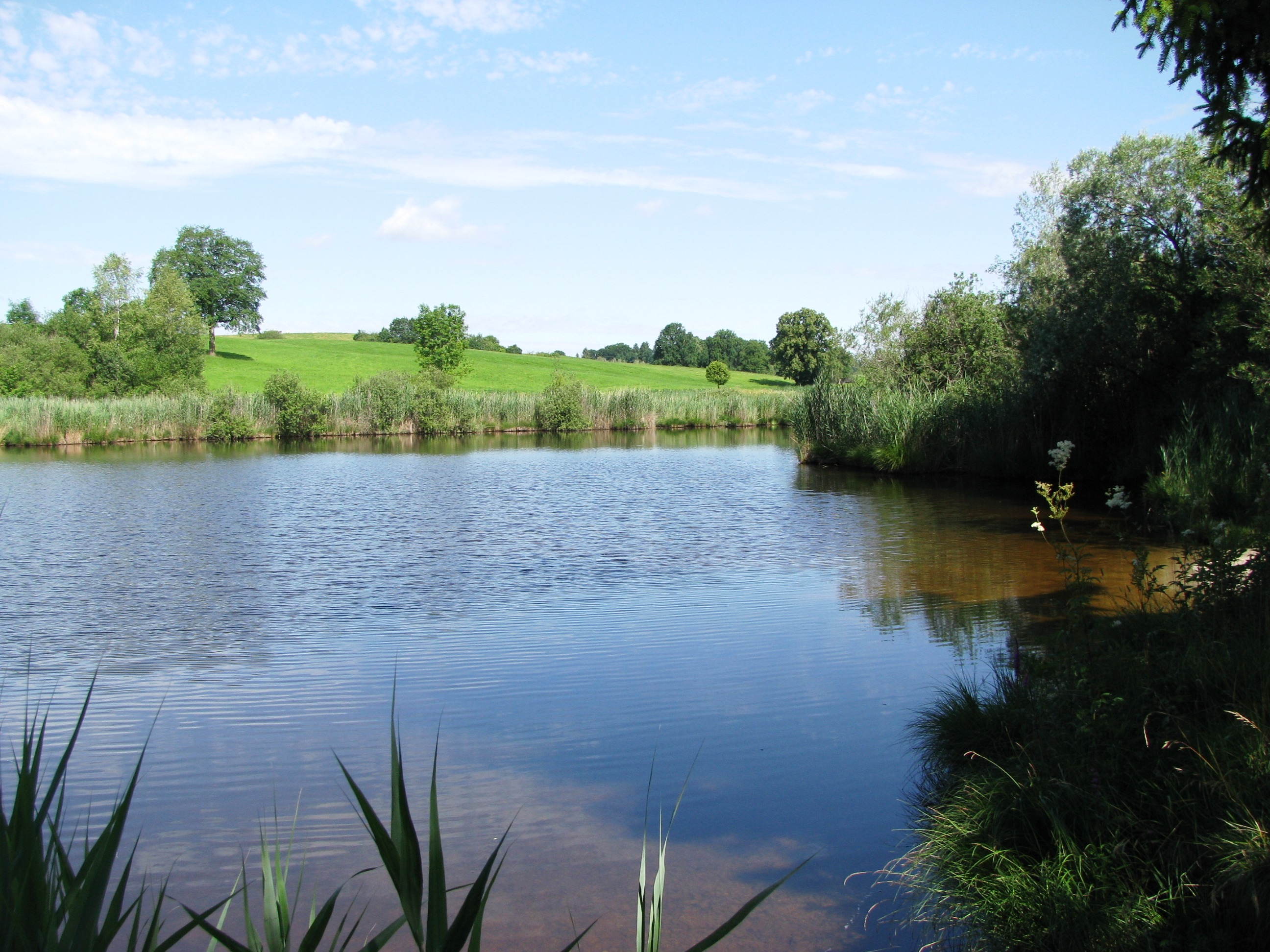 Koppenbergweiher bei Habach im Landkreis Weilheim-Schongau.